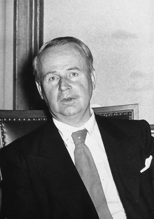 Bundesrichter am Bundesverfassungsgericht Karlsruhe Dr. Hermann Weinkauf (BGH-Präsident)